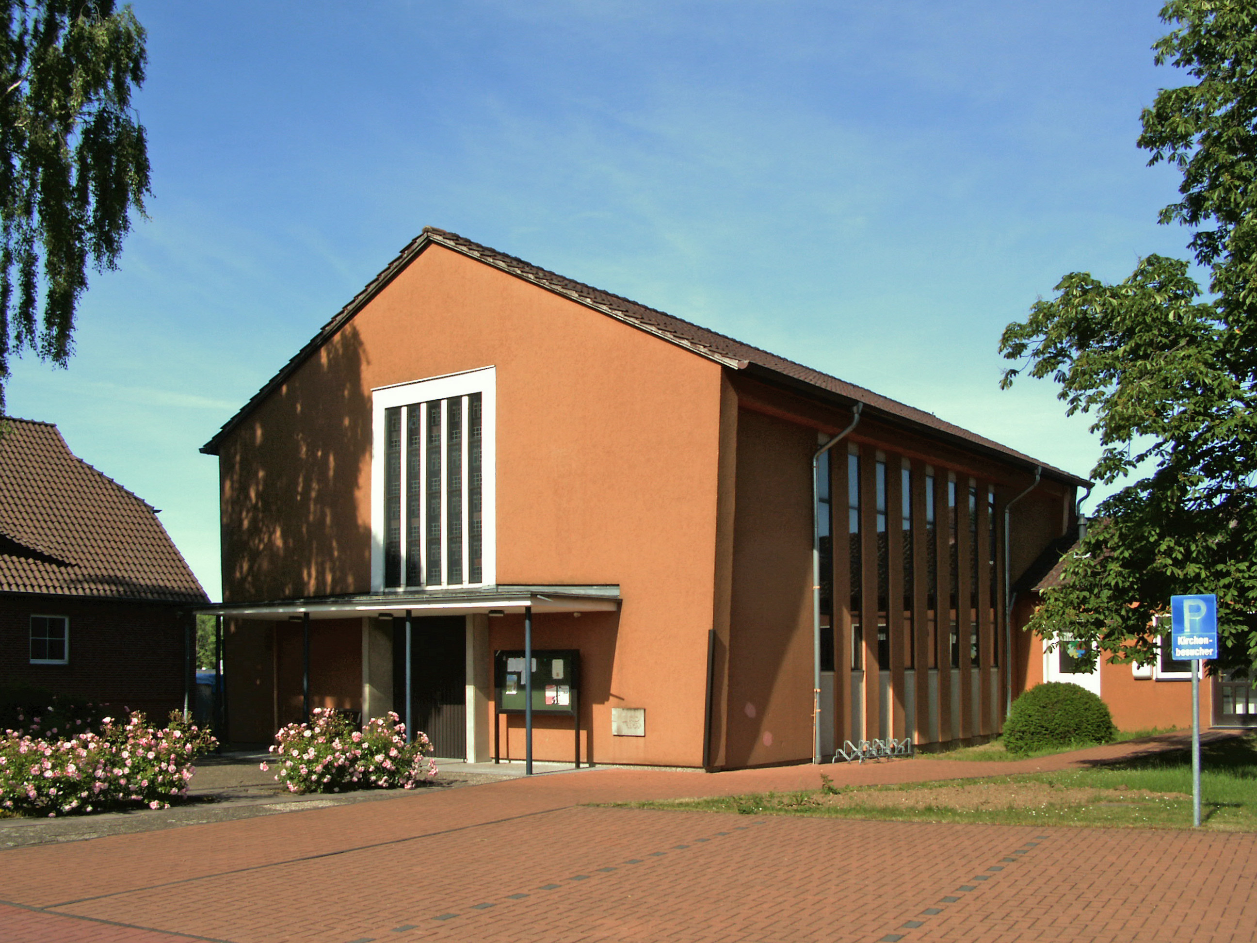 Katholische Kirche Heilig Kreuz in Schulenburg, Ortsteil von Pattensen. Profanierung am 14.04.2012.